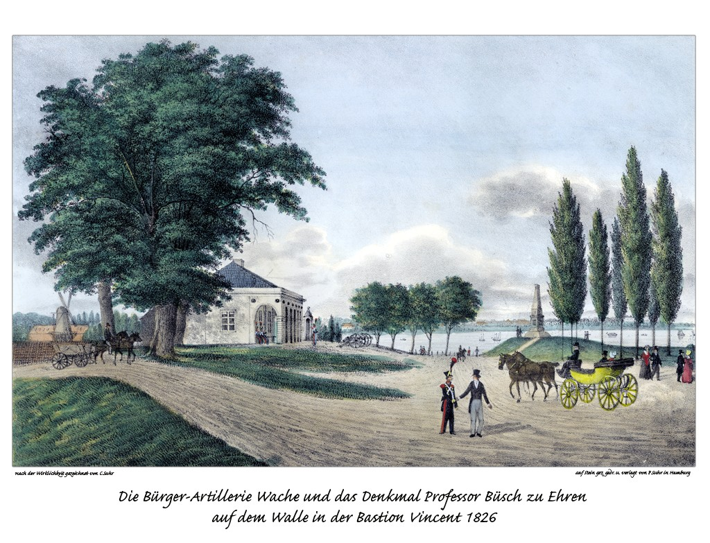 Die Bürger-Artillerie Wache und das Denkmal Professor Büsch zu Ehren auf dem Walle in der Bastion Vincent 1826, gezeichnet von Christoffer Suhr, Litho von Peter Suhr